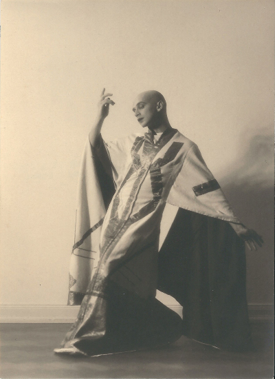 Eine Fotografie des 1905 in Hannover geborenen und 1944 in Weißrussland gefallenen Will Burgdorf; der Hannoveraner hatte sich schon in den 1920er Jahren auf Portraitfotografie spezialisierte, insbesondere von anderen Protagonisten der hannoverschen Künstlerszene. In seinen Ateliers, Anfangs in der Harnischstraße 6, dann am Lister Platz 3 sowie in der 'Podbielskistraße 12 ließen sich jedoch auch zahlreiche Privatpersonen, etwa Eltern mit ihren Kindern fotografieren. Die Aufnahme hier zeigt denTänzer und Choreografen Harald Kreutzberg ...